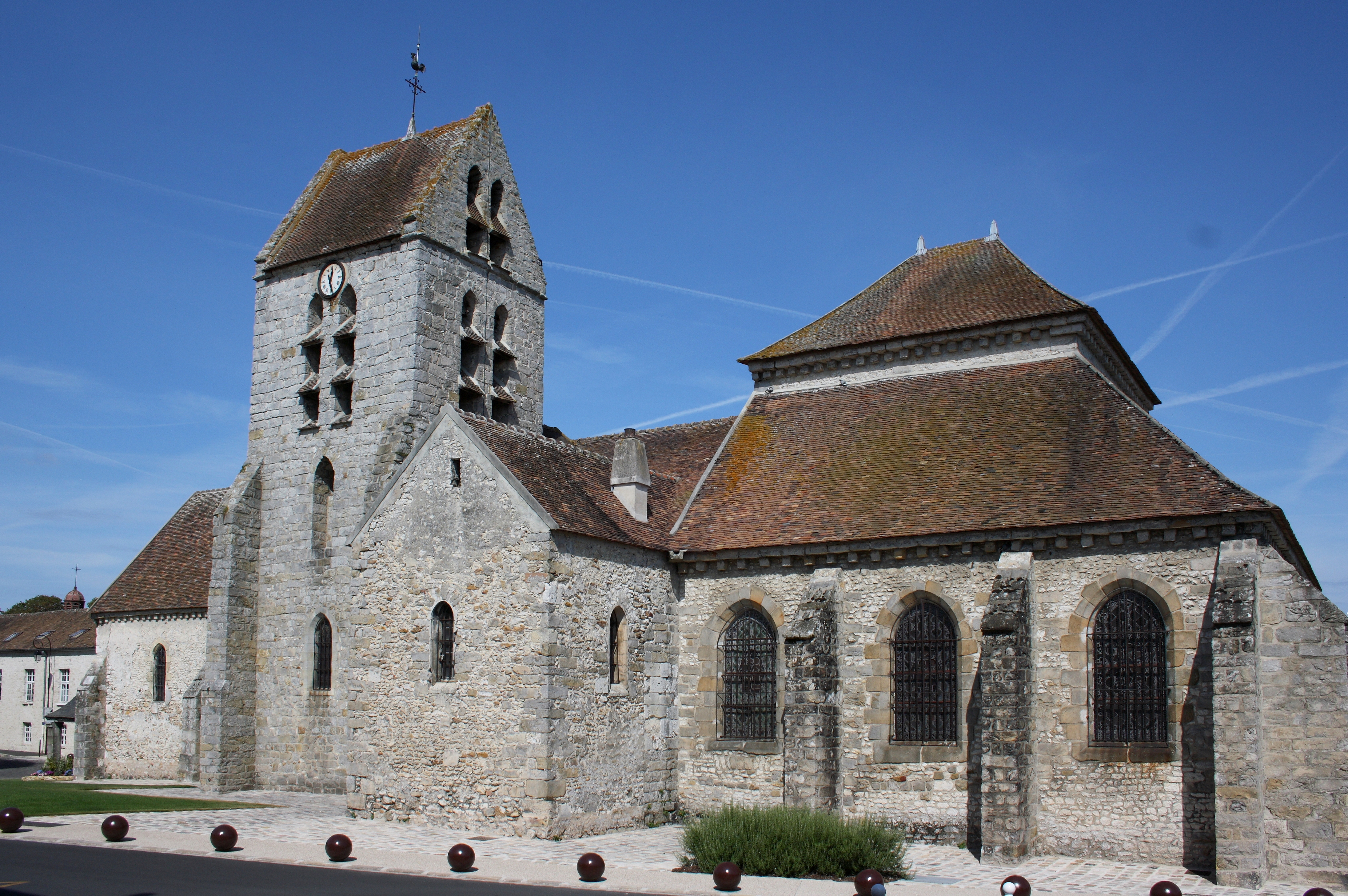 Katholische Pfarrkirche Saint-Pierre in Avon im Département Seine-et-Marne in der Region Île-de-France (Frankreich), Ansicht von Südosten Object location48° 24′ 18.72″ N, 2° 43′ 15.96″ E